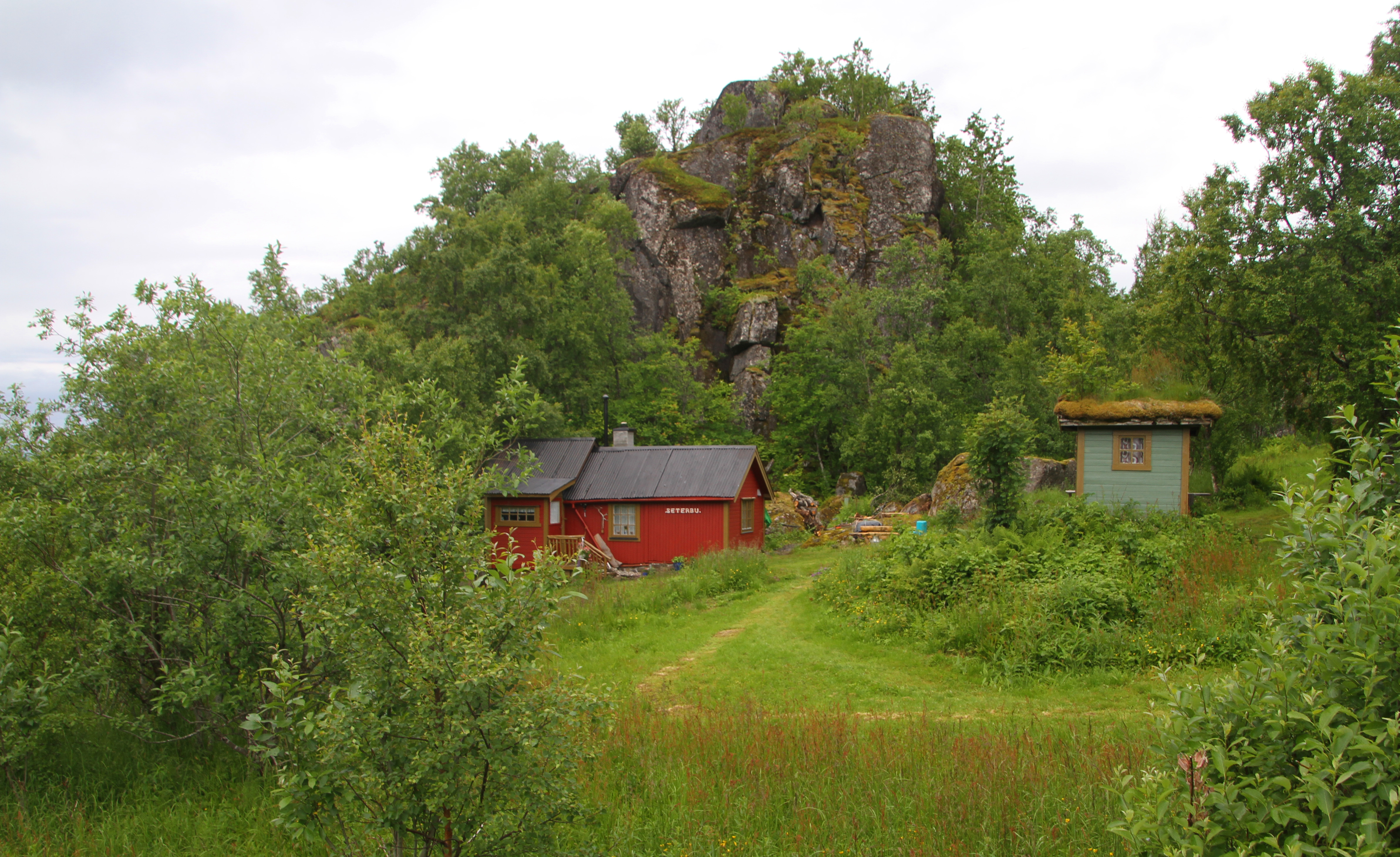 Digermulen (Vågan)